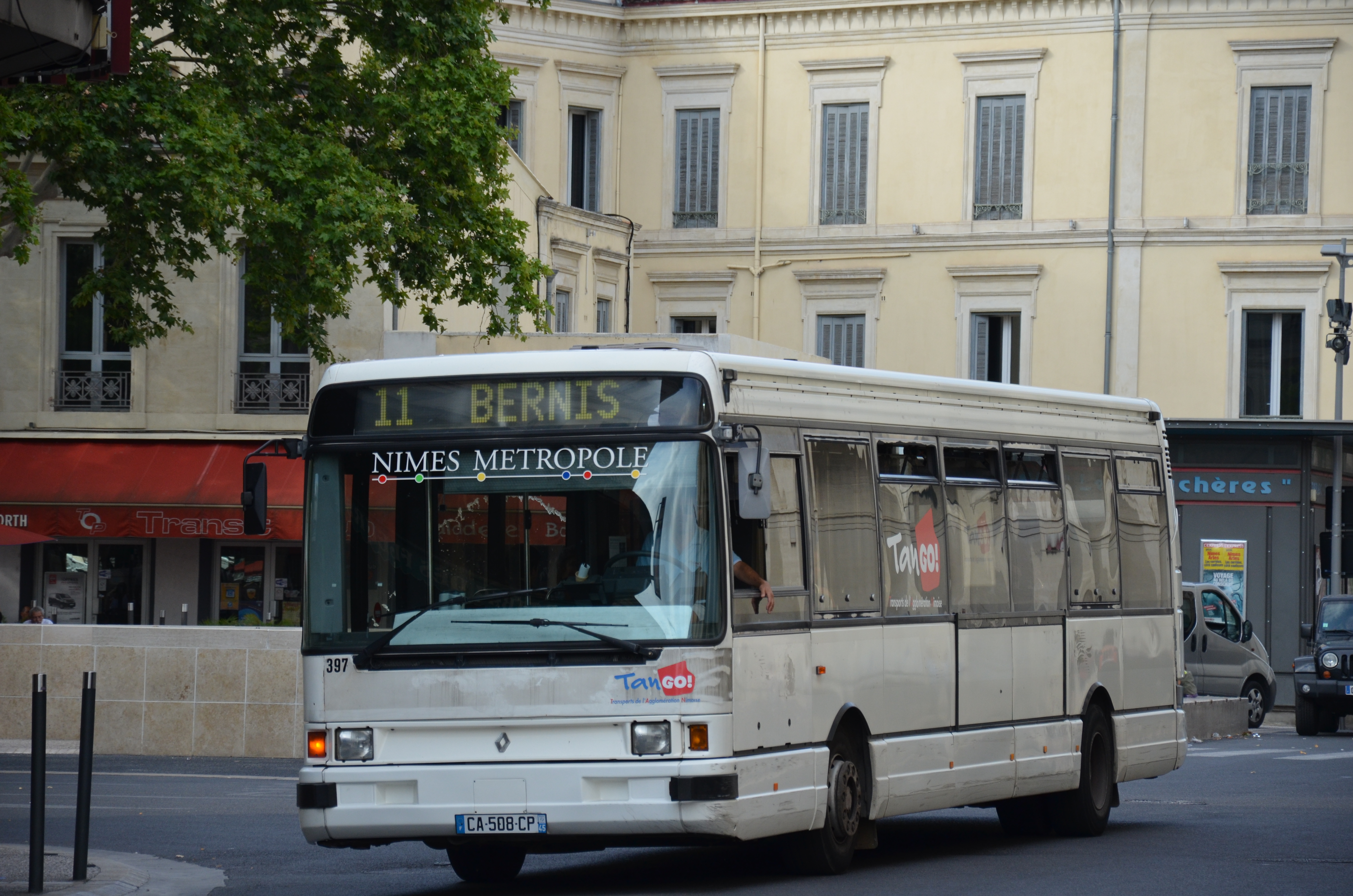 Renault R312 n°397 aperçu sur la ligne 11 du réseau TANGO, près de la gare SNCF de Nîmes.